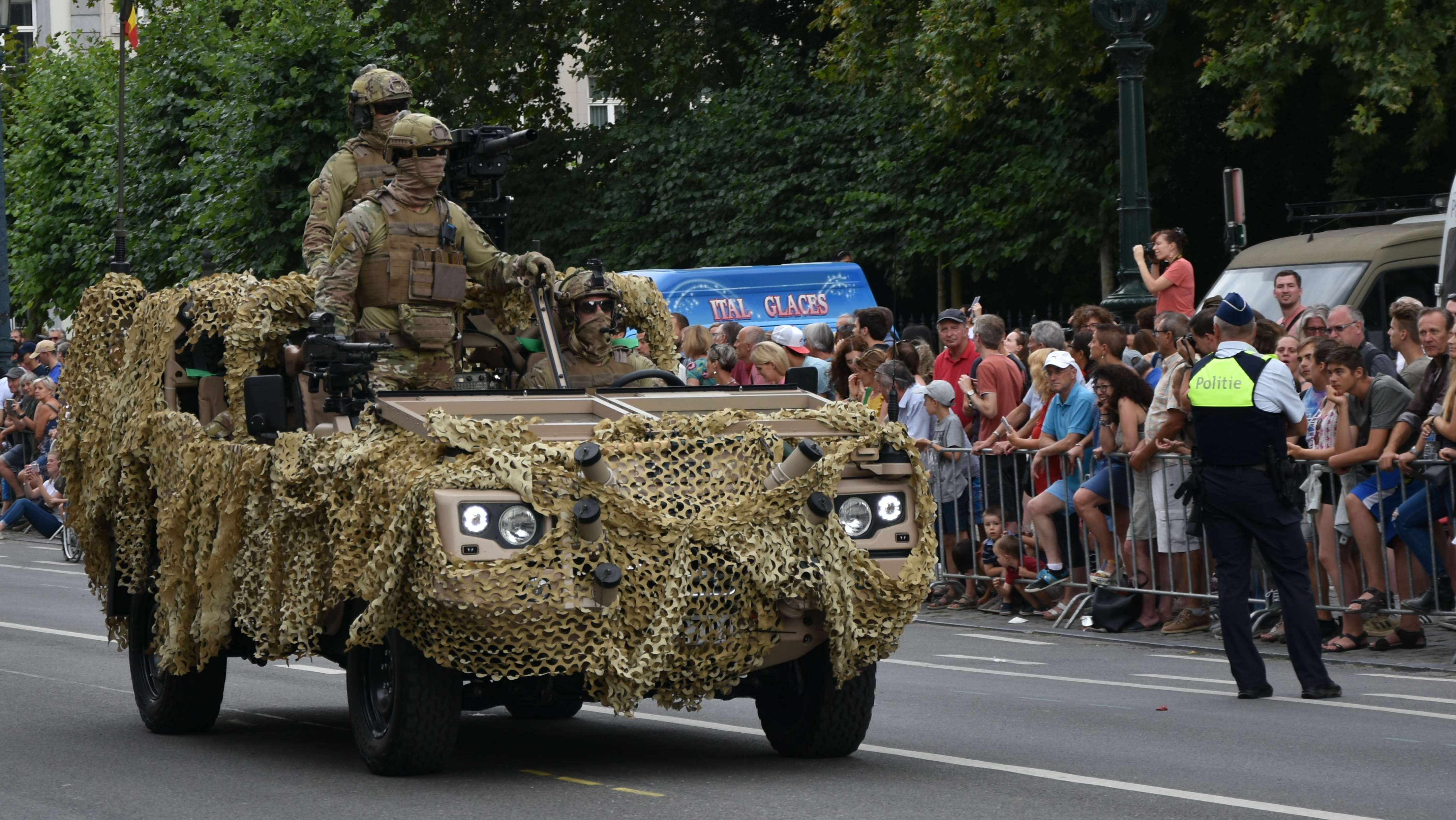 Jankel Fox Rapid Response Vehicles (RRV) - Nationaal defilé 2018 This photo of immaterial heritage has been taken in the Brussels Capital Region